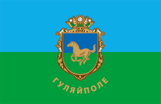 Прапор Гуляйпільського району